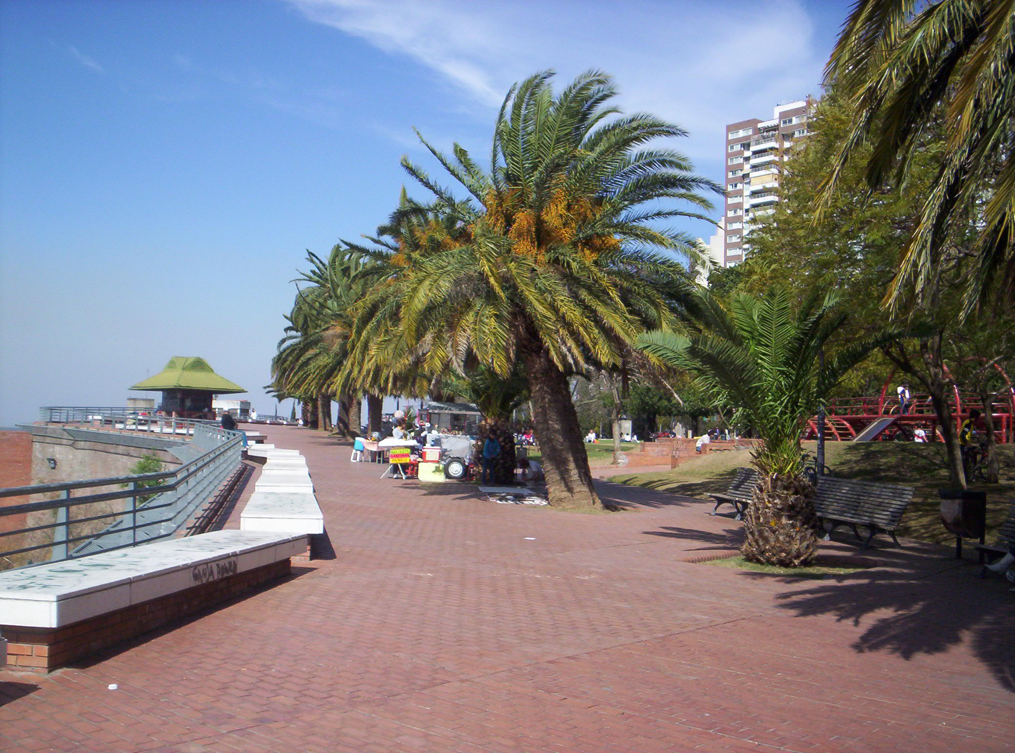 Costanera de Rosario